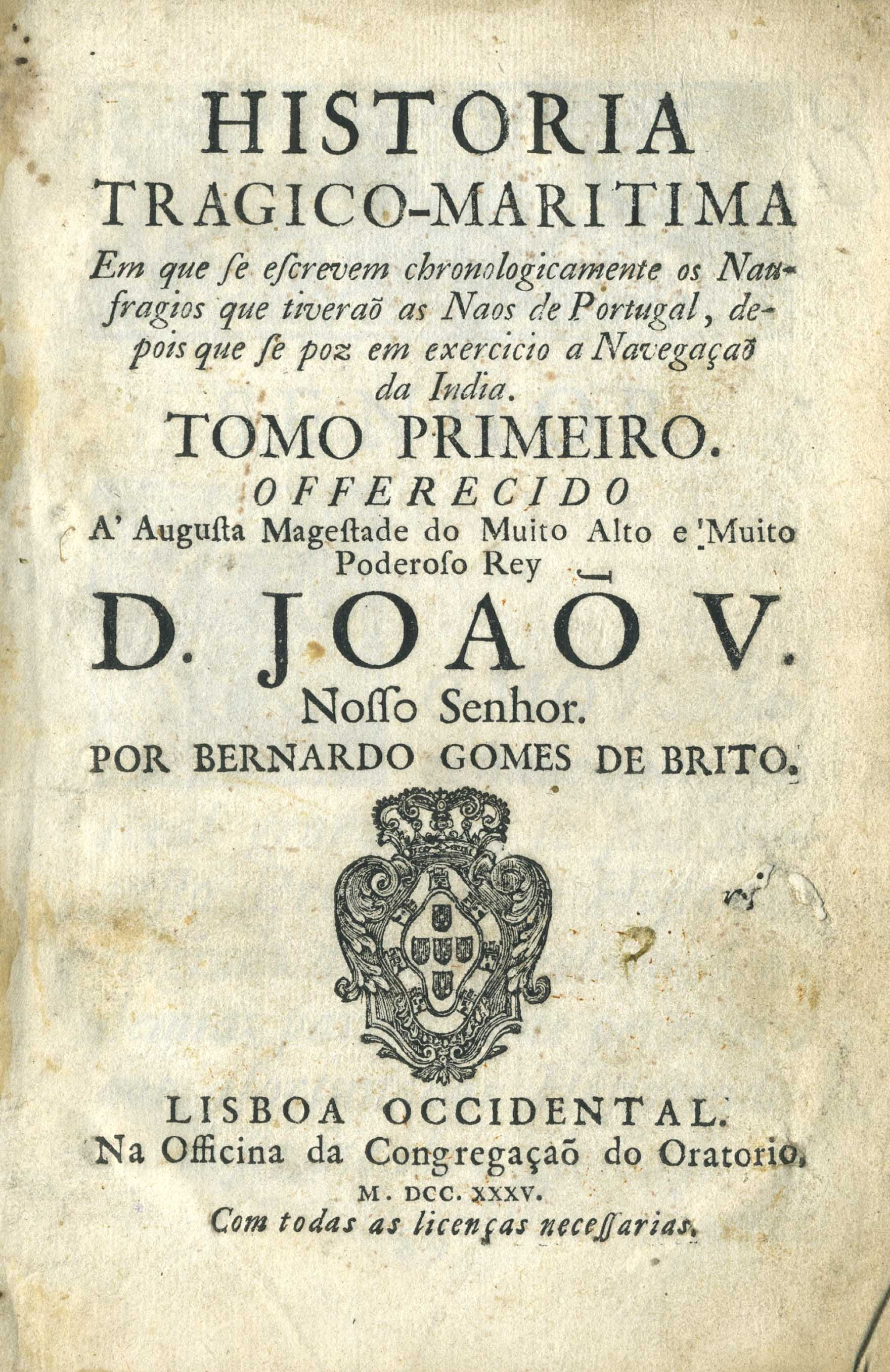 in Frontispive du 1° tome de l' Histoire tragico-maritime, de Bernardo Gomes de Brito, Lisbonne, 1735